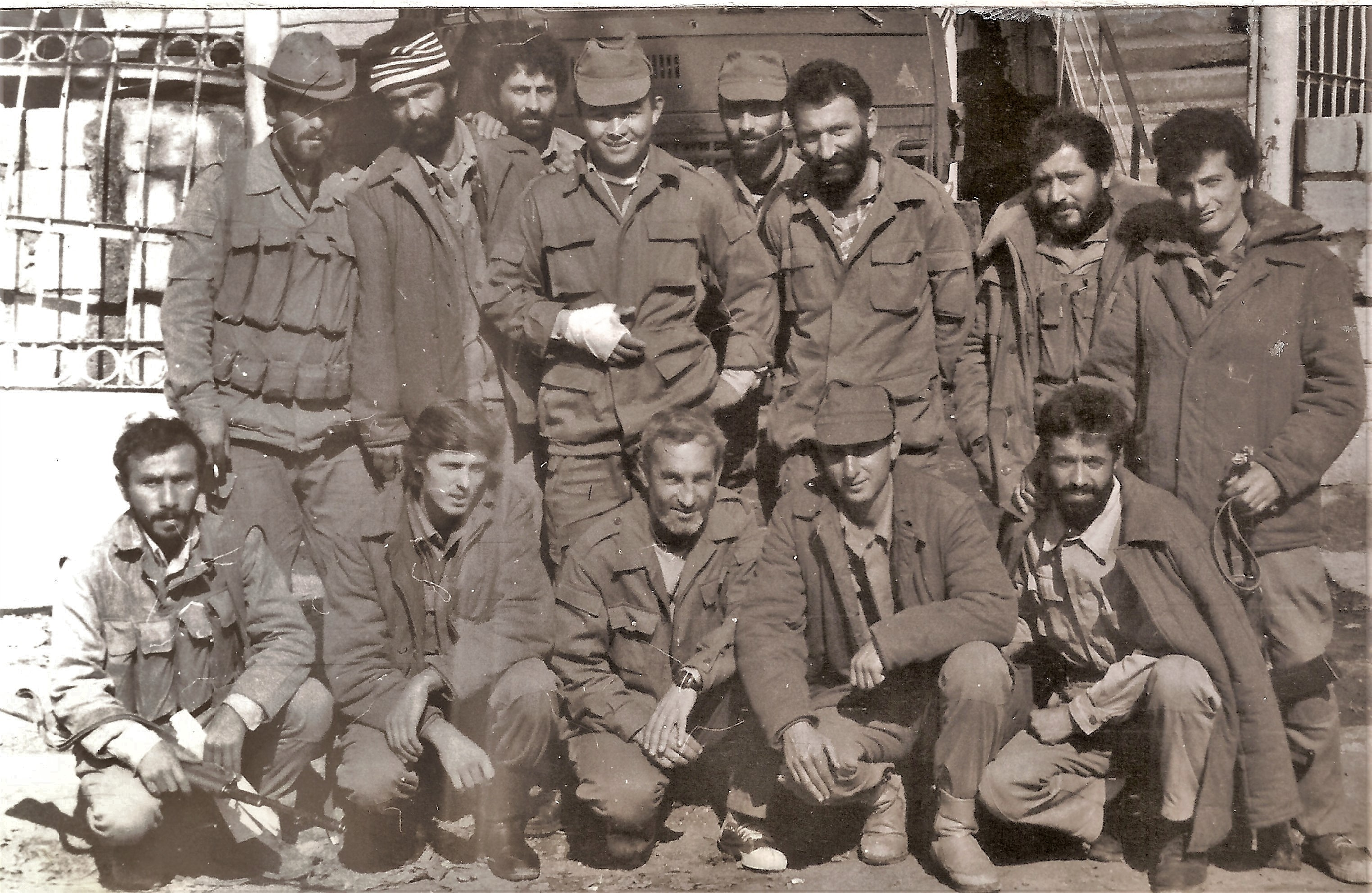 На фотографии бойцы 8-й стрелковой роты Степанакертского Полка Сил Самообороны Нагорно-Карабахской Республики. 8-я Рота распологалась на территории бывшего степанакертского сельскохозяйственного техникума. 1 октября 1992 года. На переднем плане, второй слева сидит этнический русский. В центре с повязкой на руке стоит этнический казах. Остальные - армяне.